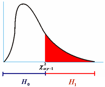 Покажува области на отфрлање или прифаќање на нултата хипотеза